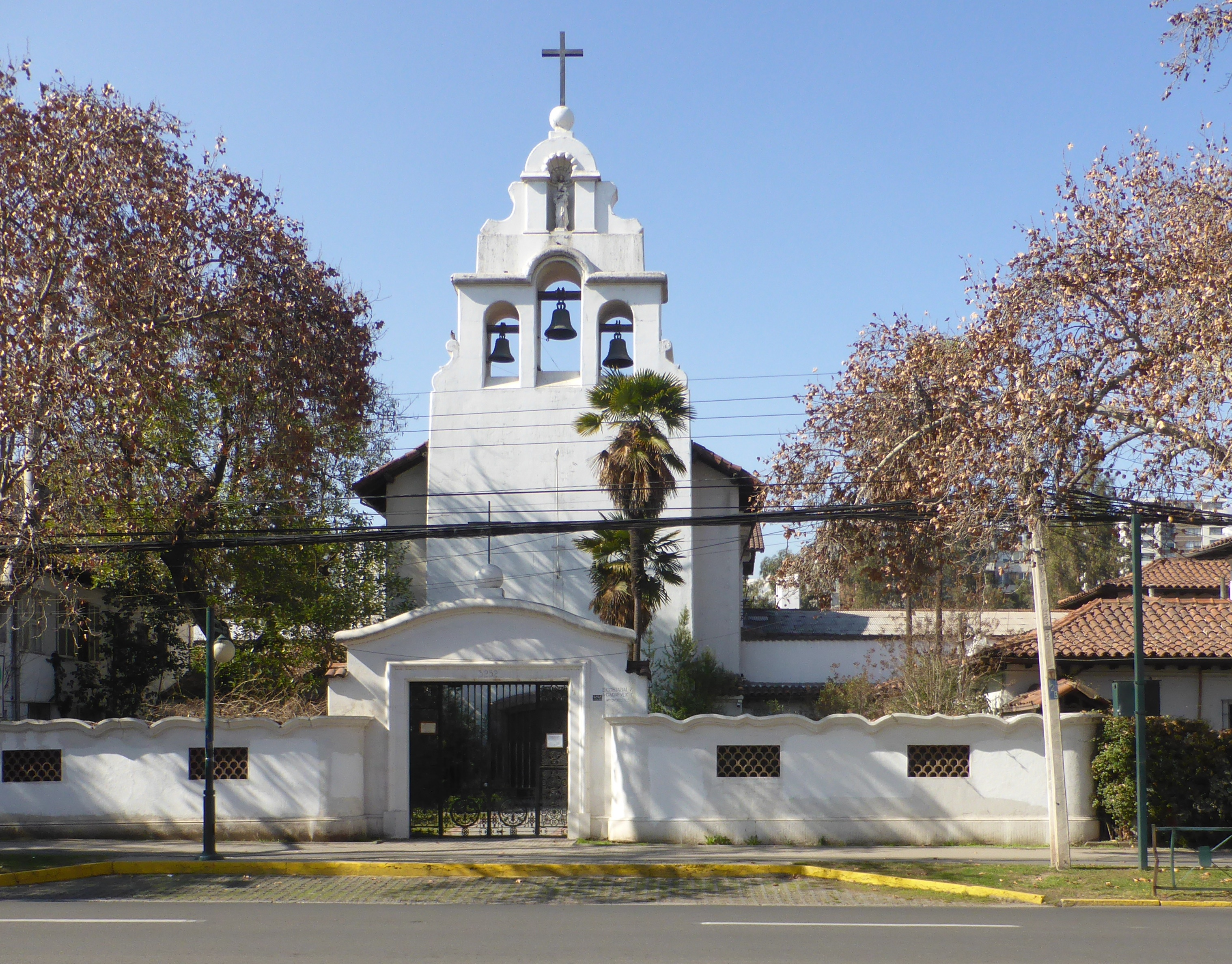 El actual inmueble del "Monasterio de Carmelitas Descalzas de San José", en avenida Pedro de Valdivia, de la comuna de ÑUÑOA, es del año 1944. Pero las hermanas de esta congregación se establecieron en Chile en 1690. La torre o campanario de la iglesia actual es una espadaña, de estilo entre neorrenacentista y neobarroco.